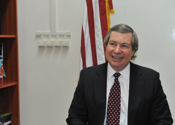 ATƏT-in Minsk qrupunun amerikalı həmsədri Ceyms Uorlik